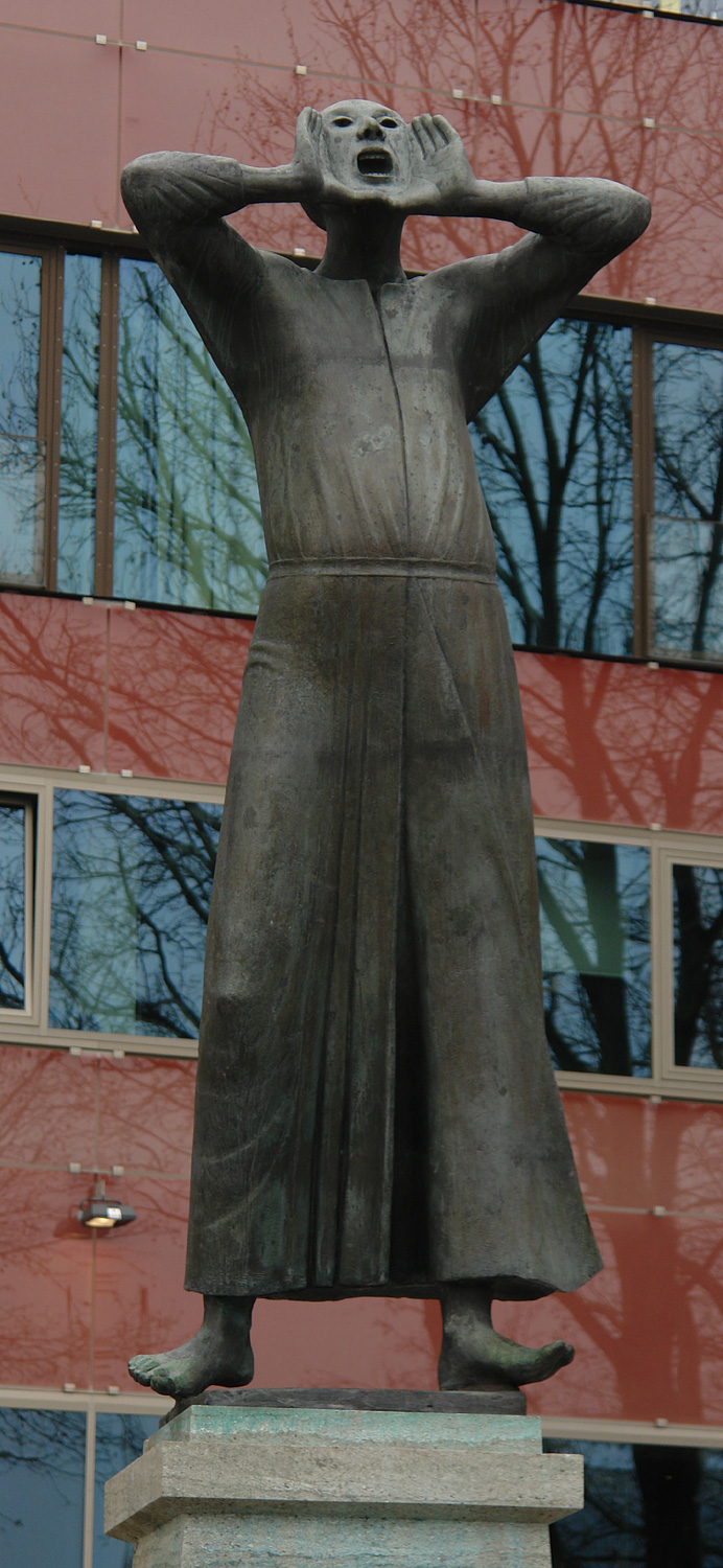 „Der Rufer“ von Gerhard Marcks an der Schlachte. Am Fernsehstudio von Radio Bremen an der Hans-Bredow-Straße 10 wurde der Rufer am 24. November 1967 eingeweiht. Umzug an die Schlachte 2007, dort eingeweiht am 23. November 2007.